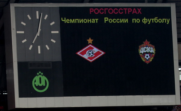 Спартак-ЦСКА